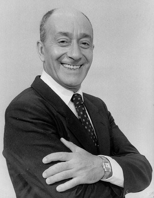 Rosario Argentina